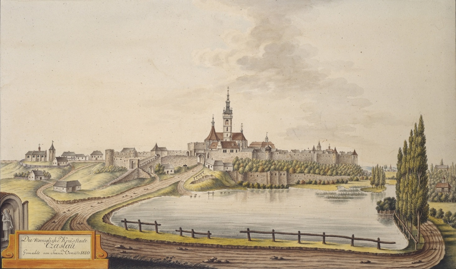 Die Koenigliche Kreisstadt Czaslau gemahlt von Joann Venuto 1810